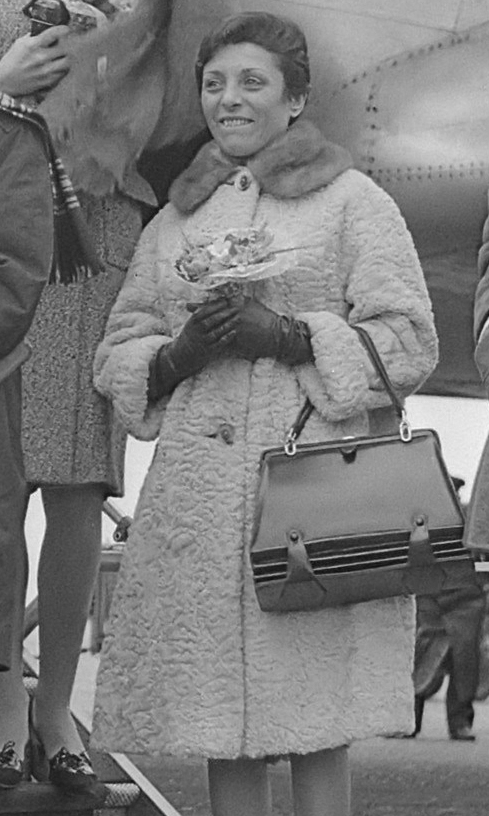 The Swingle Singers (1964) (cut) De Franse vocale groep "Les Swingle Singers" uit Parijs op Schiphol voor optreden Avro 4 maart 1964